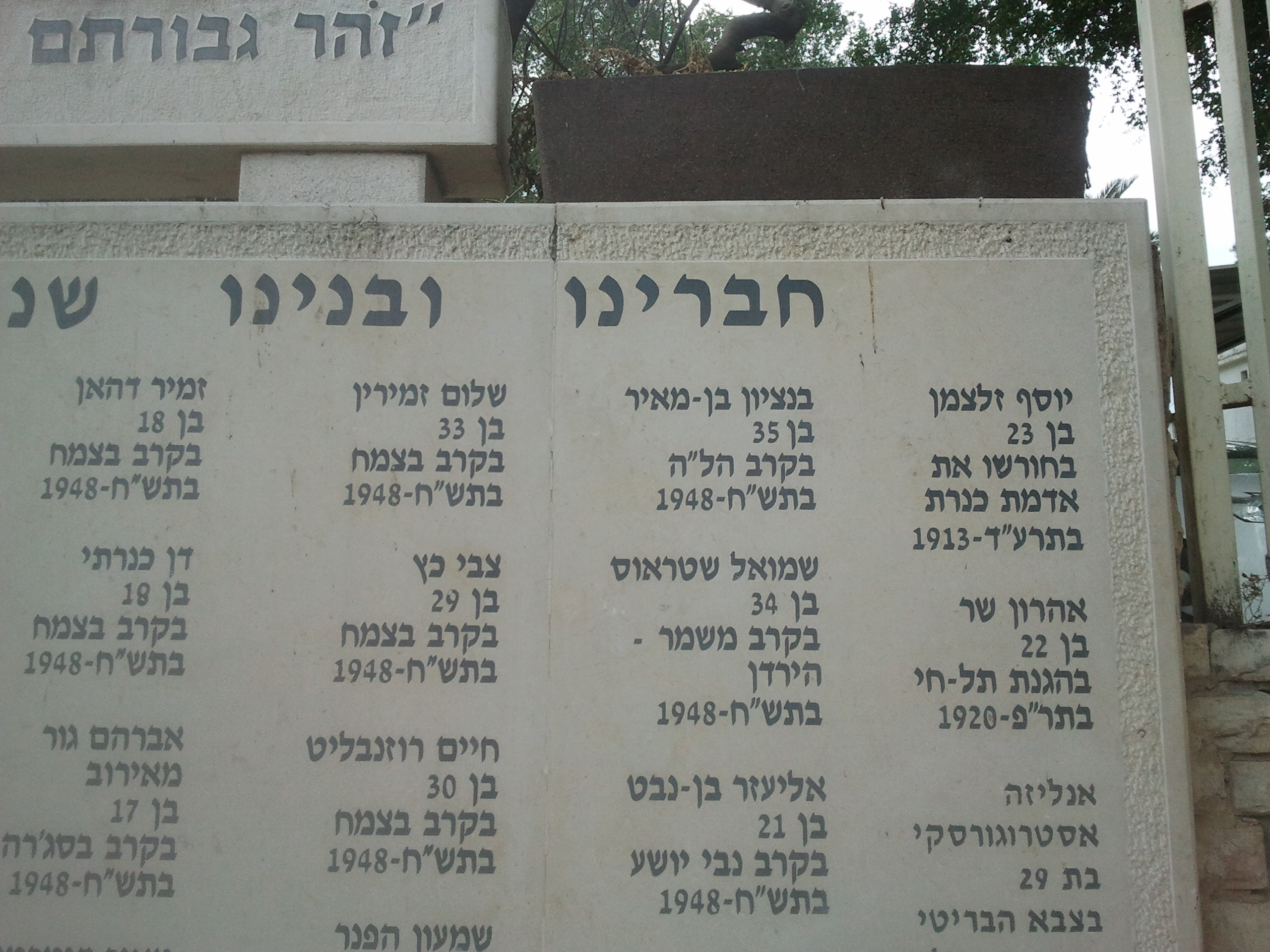 שמו של יוסף זלצמן על האנדרטה בכנרת . היה מראשוני קבוצת כנרת שנרצח בשנת 1913 על ידי ערבי . הוא נקבר במקום בו נרצח. זהו קבר בודד בין ביתניה תחתית של אז לקבוצת כנרת